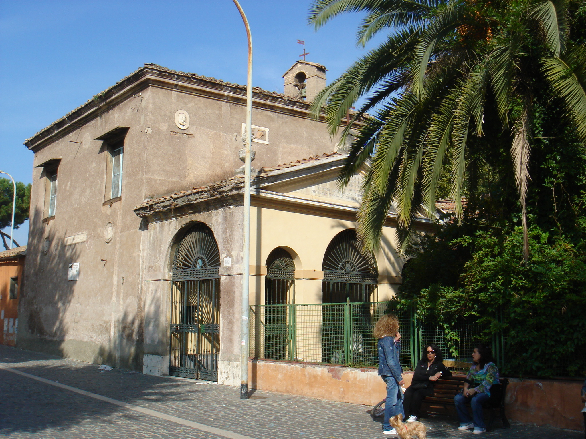 Roma, Garbatella: la chiesoletta (Santi Isidoro ed Eurosia)